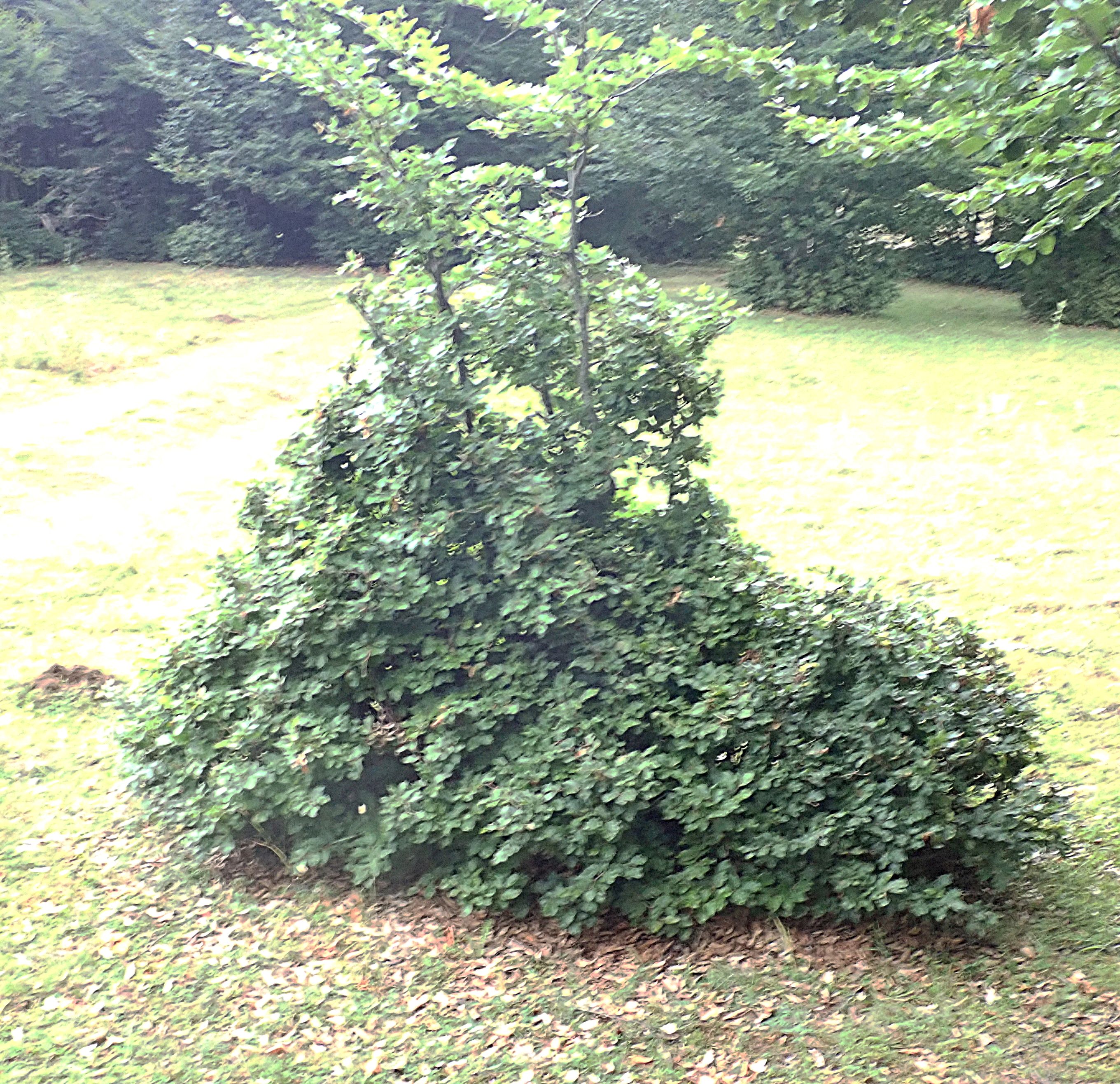 Durch Verbiss am zu einem dichten Busch reduzierte kleine Rotbuche, in Griechenland bei Metsovo, in der Mitte ohne Verbiss